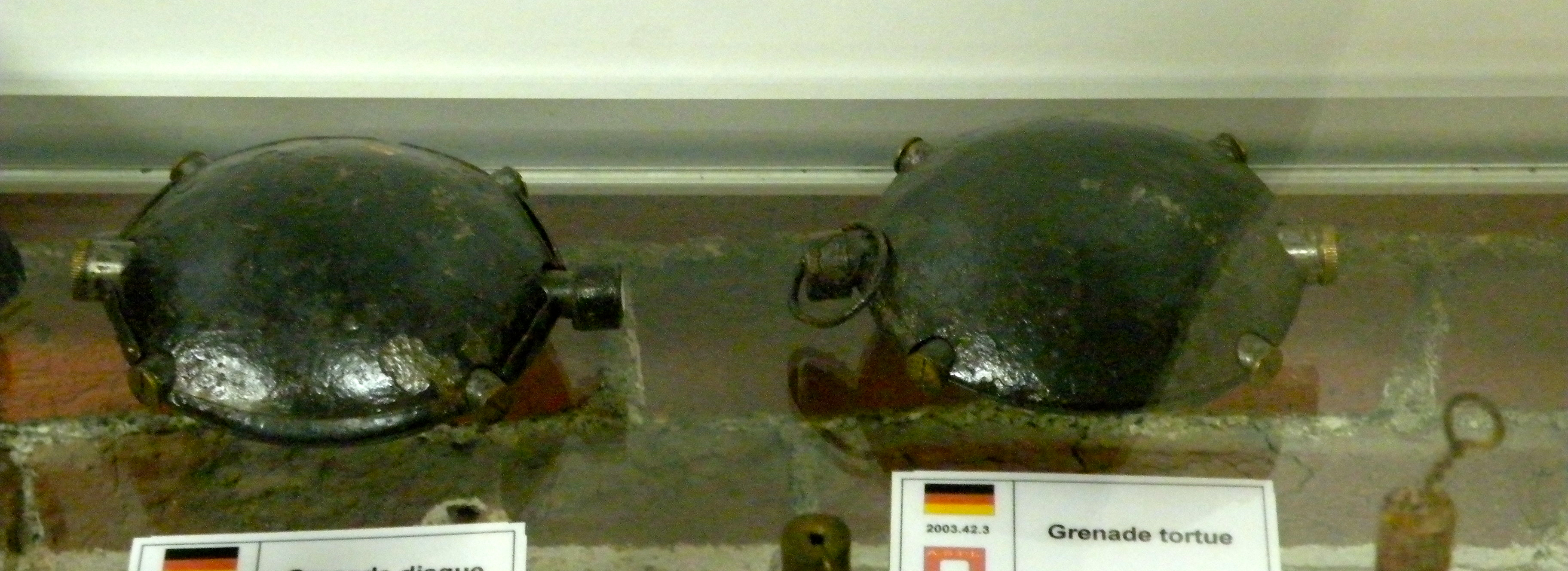 Collection du Fort de Leveau